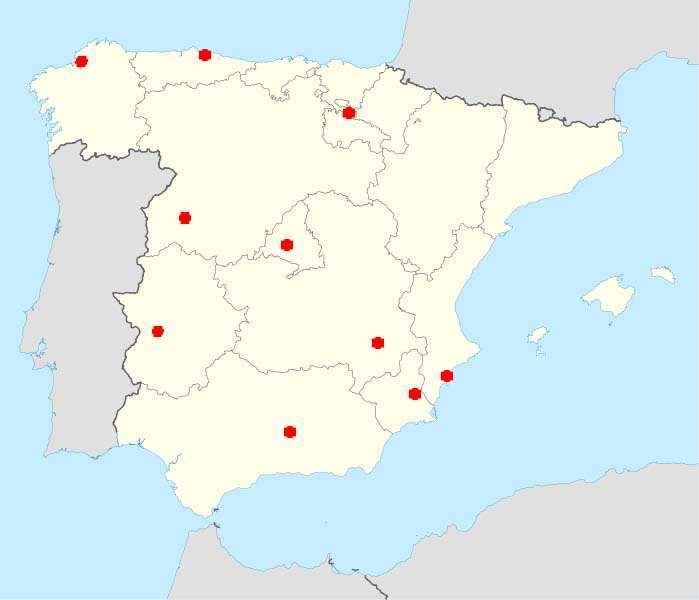 Hjemmebanene til Spania i kvalifiseringene til VM 2010 og EM 2012